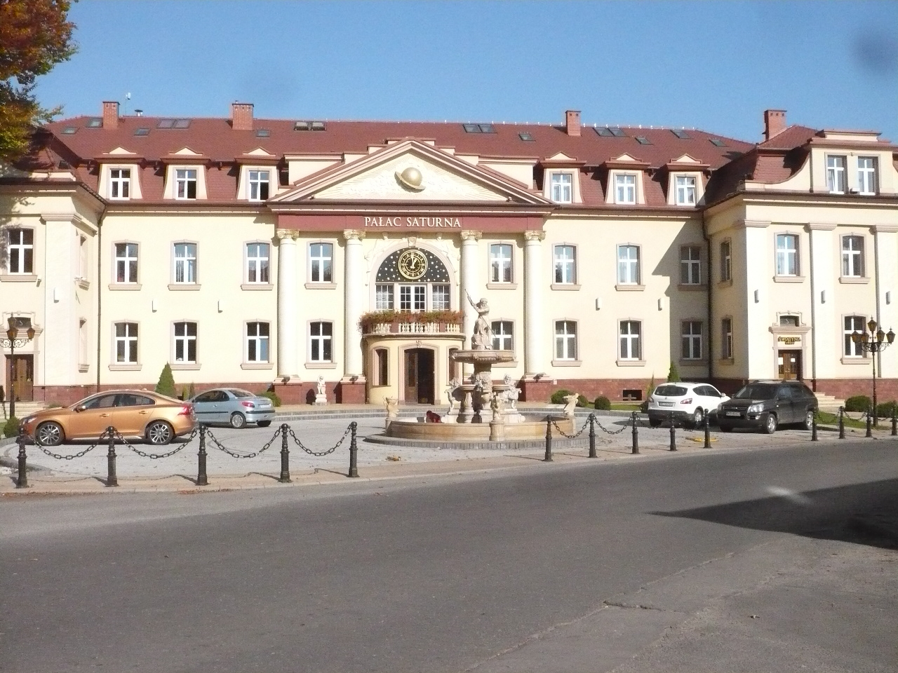 Czeladz_Pałac Satrurn - Termy Rzymskie_widok ogólny; X 2012